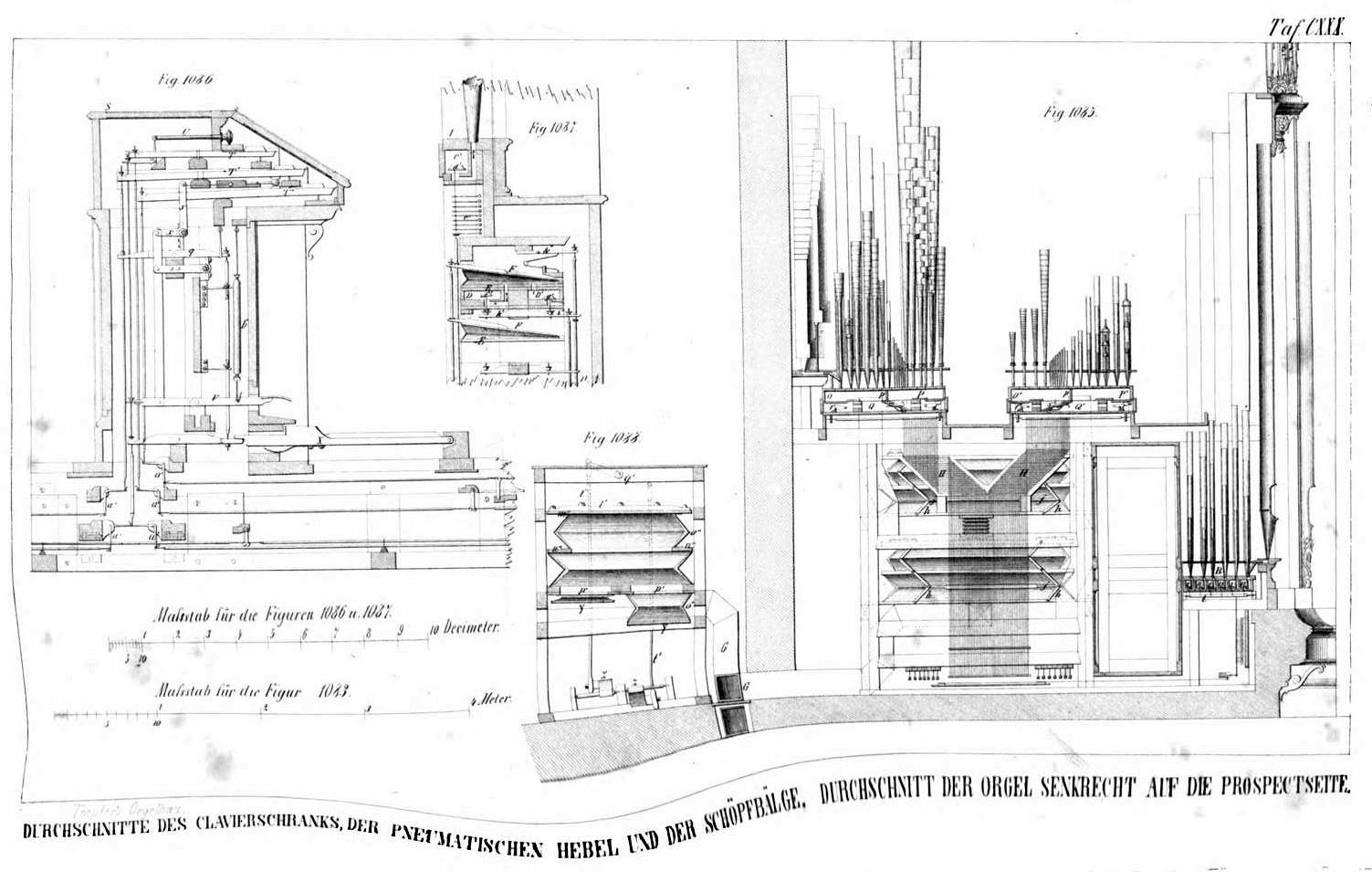 Tafel aus Johann Gottlob Töpfer: Atlas zum Lehrbuch der Orgelbaukunst, Weimar 1855Tafel 130, Durchschnitte des Clavierschranks, der pneumatischen Hebel und der Schöpfbälge der Orgel senkrecht auf die Prospectseite (Kirche zu St. Vincent-de-Paul) (crappy Google scan, hence distorted)